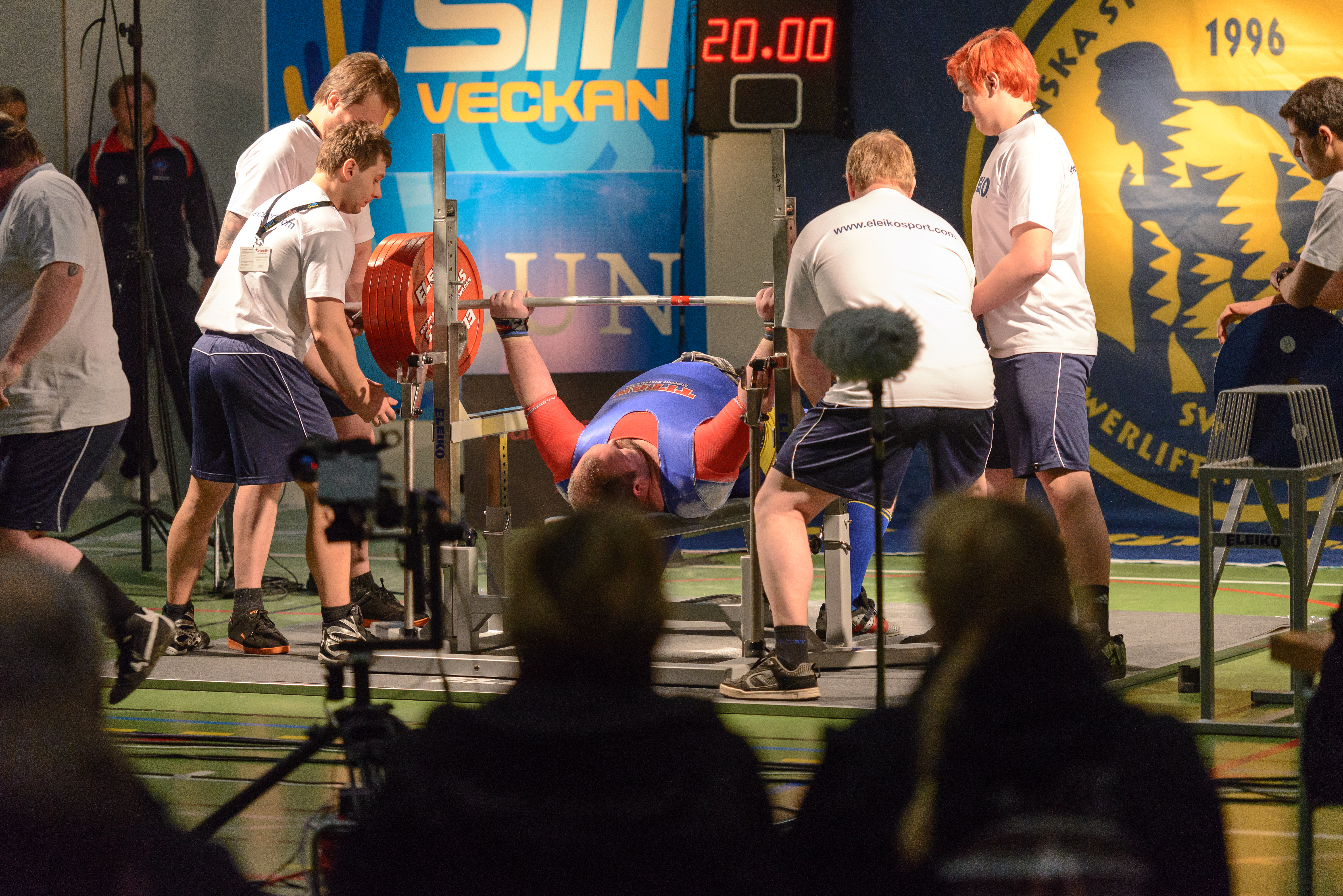 SM i bänkpress 2013, Fredrik Svensson Sundsvalls AK